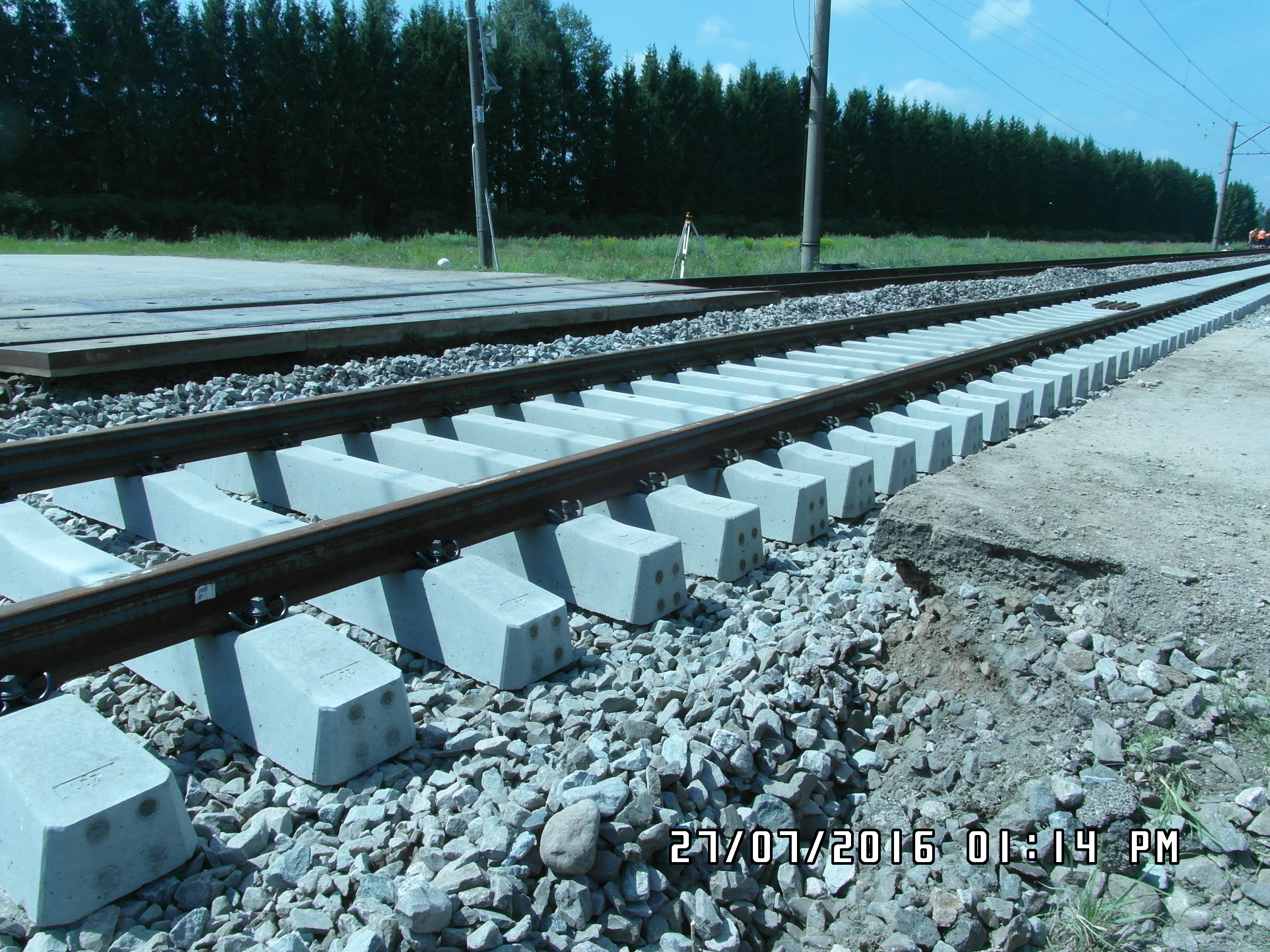 Pārbrauktuves sliežu gulšņu režģis